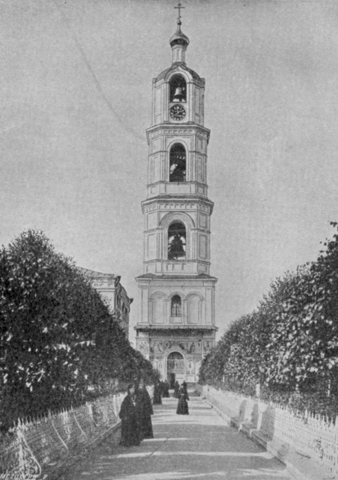 Колокольня Иверского монастыря (Выкса)